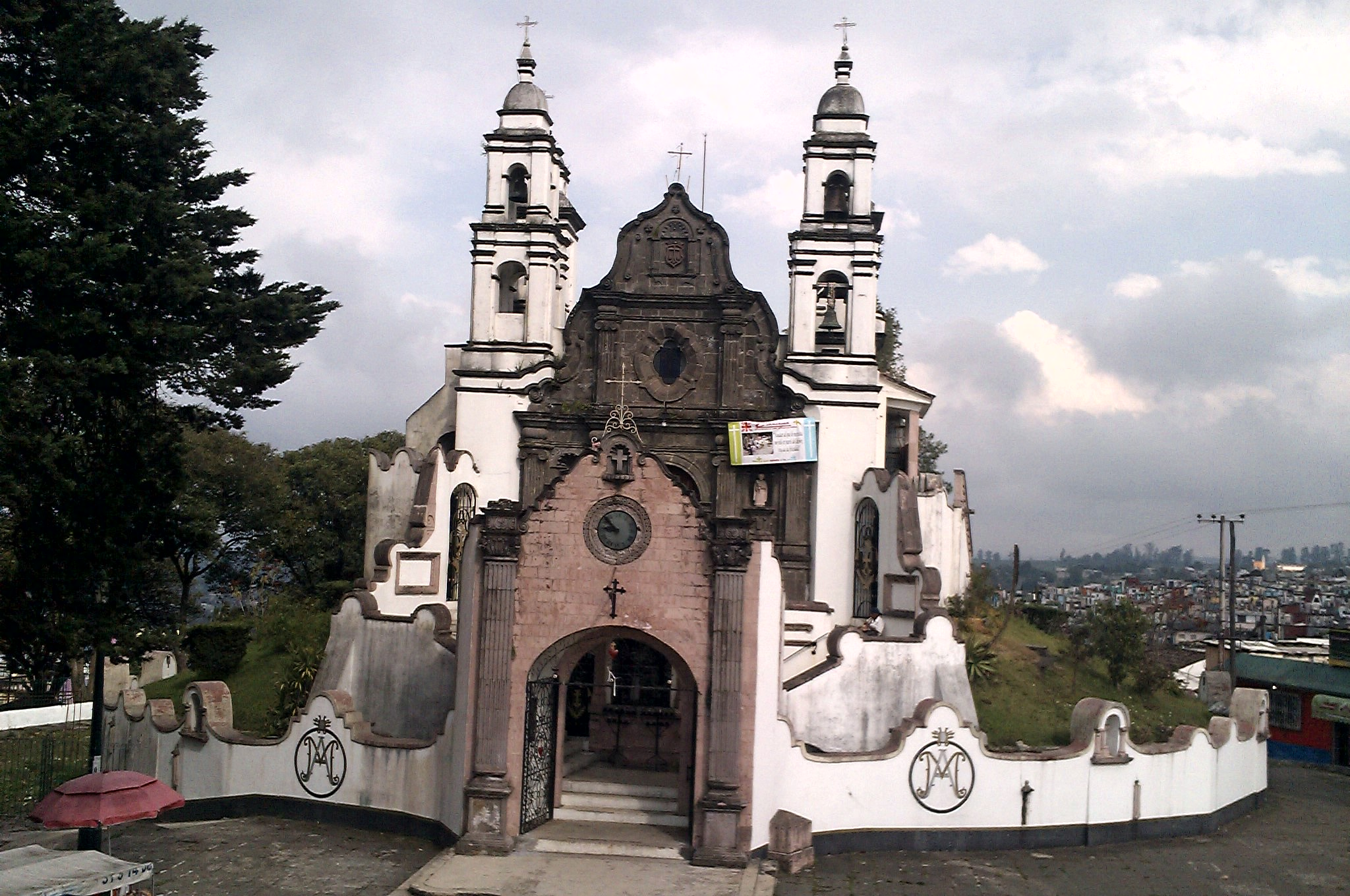 Foto tomada desde el restaurant